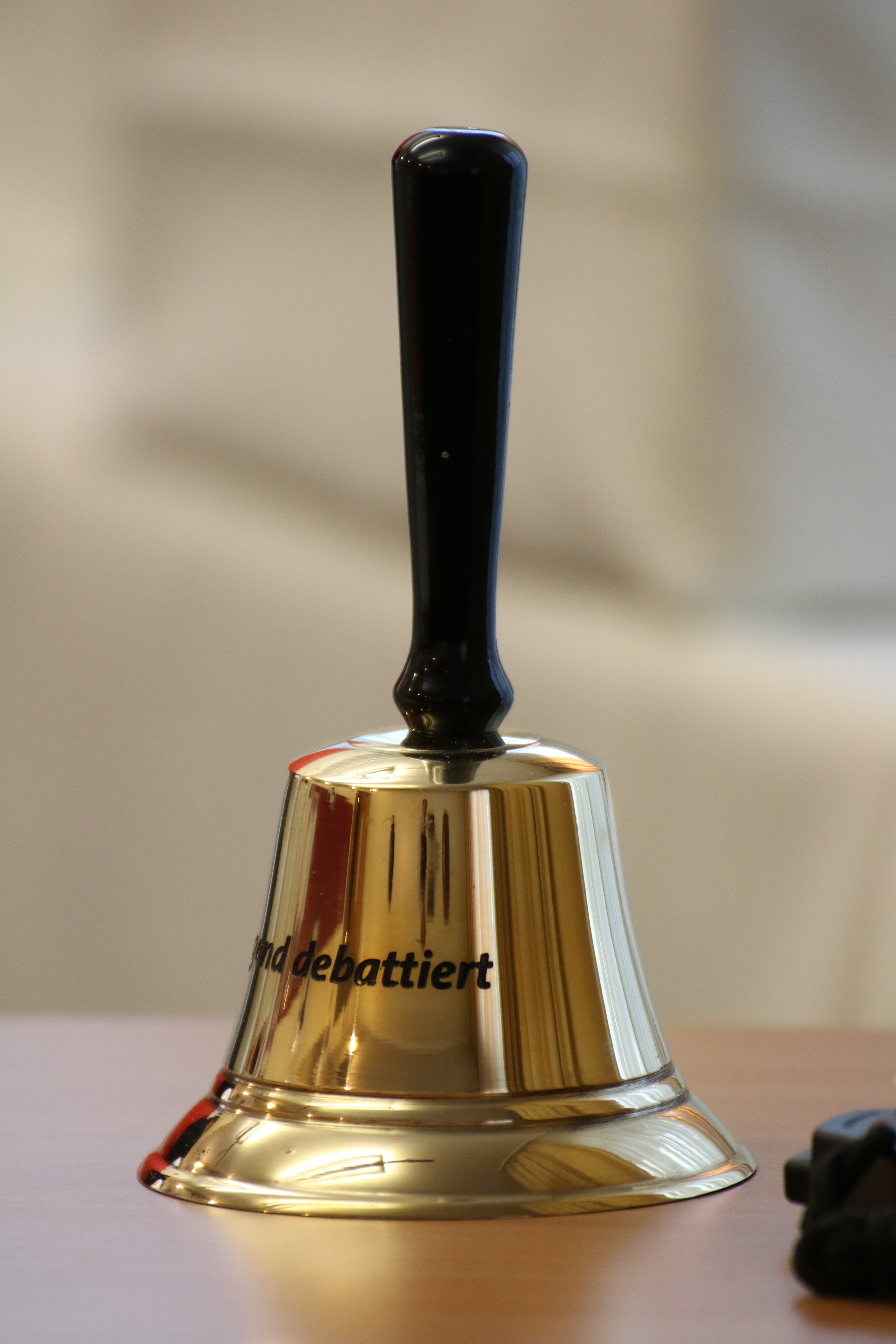 Bundesqualifikation Jugend debattiert 2016; Hotel NH Berlin Alexanderplatz